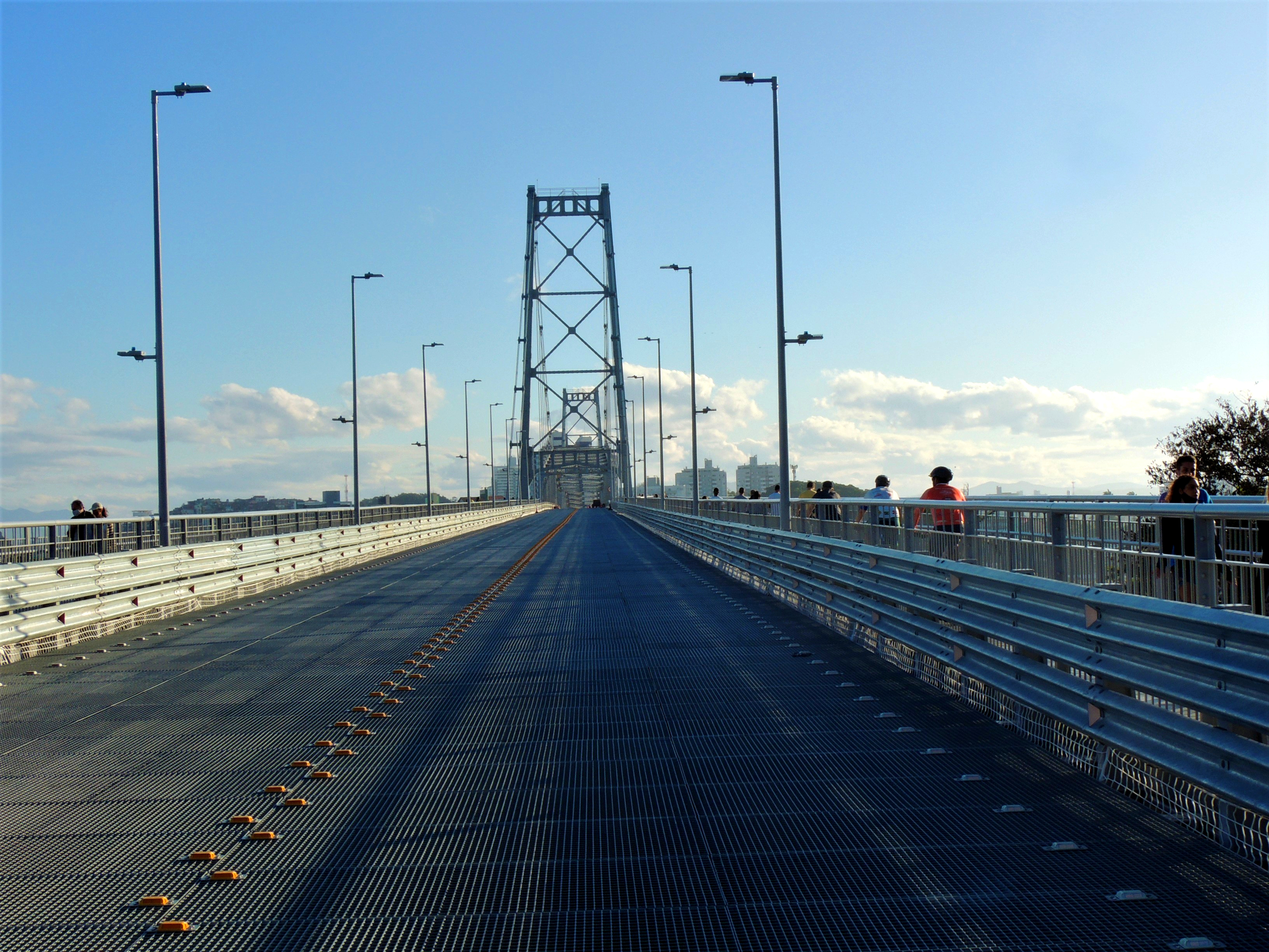 A Ponte Hercílio Luz é uma ponte pênsil localizada em Florianópolis (Nossa Senhora Do Desterro), no estado brasileiro de Santa Catarina. É a maior ponte suspensa do Brasil, com 821 metros - sendo a maior ponte pênsil sustentada por um sistema de barras de olhal ainda existente, e possui o 132º maior vão pênsil do mundo, com 339 metros. Apelidada de "Velha Senhora", é o símbolo mais famoso da cidade e do estado, sendo a imagem mais reconhecida de ambos. A ponte foi projetada e construída durante o governo de Hercílio Luz para ser a primeira ligação terrestre entre a ilha e o continente. O idealizador não viu seu sonho ser concluído, pois morreu em 1924, doze dias depois de inaugurar uma réplica de madeira. O projeto é de autoria dos engenheiros norte-americanos Robinson e Steinman, e todo o material nela empregado foi trazido dos Estados Unidos, tendo sido construída por equipe composta de dezenove técnicos especializados norte-americanos e operários catarinenses. Após anos fechada e apenas sendo mantida, uma parceria entre o Governo Federal, Governo do Estado e a Prefeitura de Florianópolis em 2005 proporcionou o início das obras de restauração da ponte Hercílio Luz. Em dezembro de 2019 o governo do estado confirmou a reabertura do trânsito na ponte, o que aconteceu no dia 30 de dezembro do mesmo ano. O fim das obras, ficou para 2020, com a retirada das estruturas auxiliares sob o vão central.